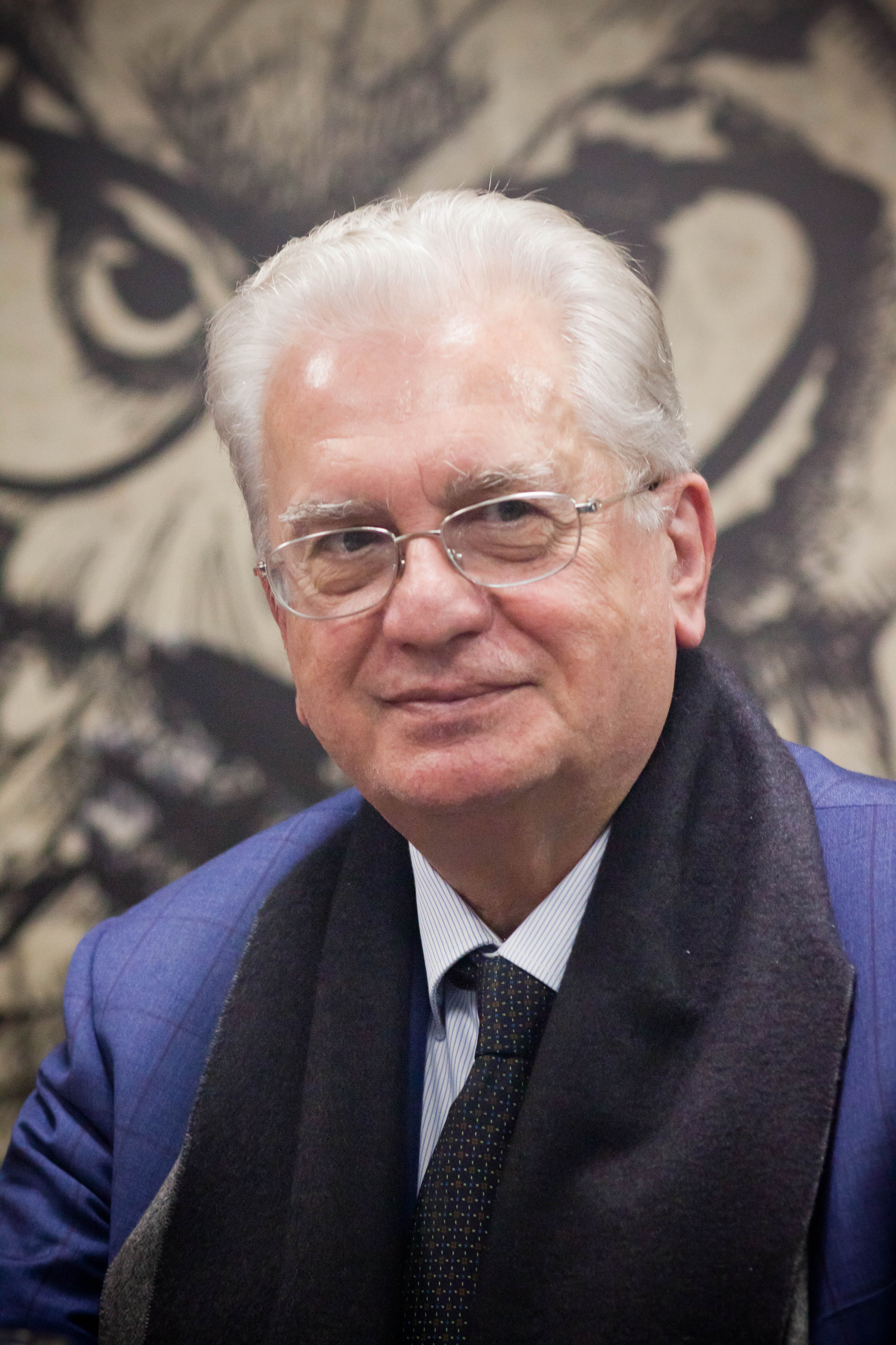 Михаио Пиотровский на презентации книги Джеральдин Норман "Пиотровские. Хранители ковчега" в Московском доме книги на Новом Арбате